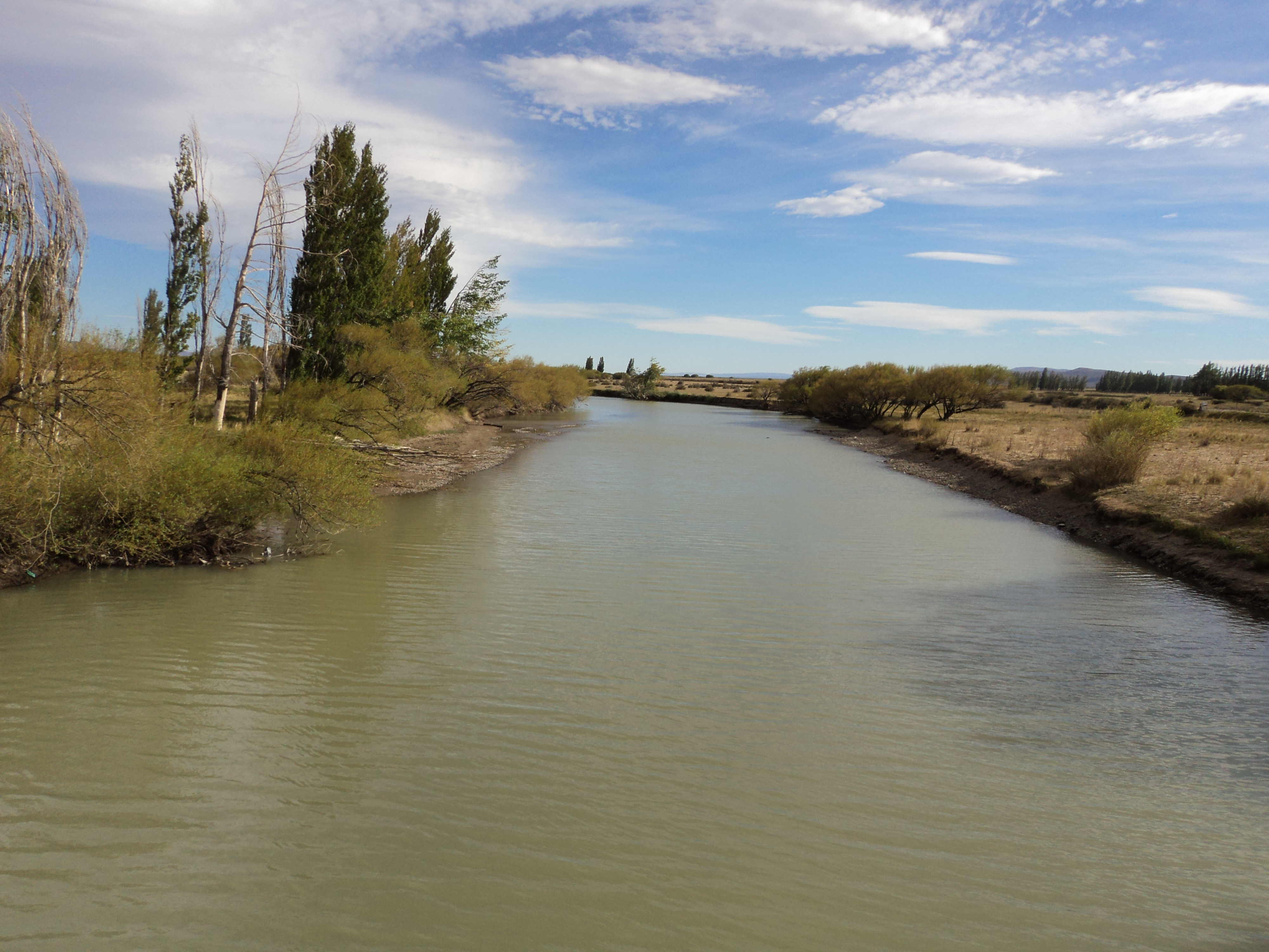 Río Senguer visto desde el Puente Desiderio Torres